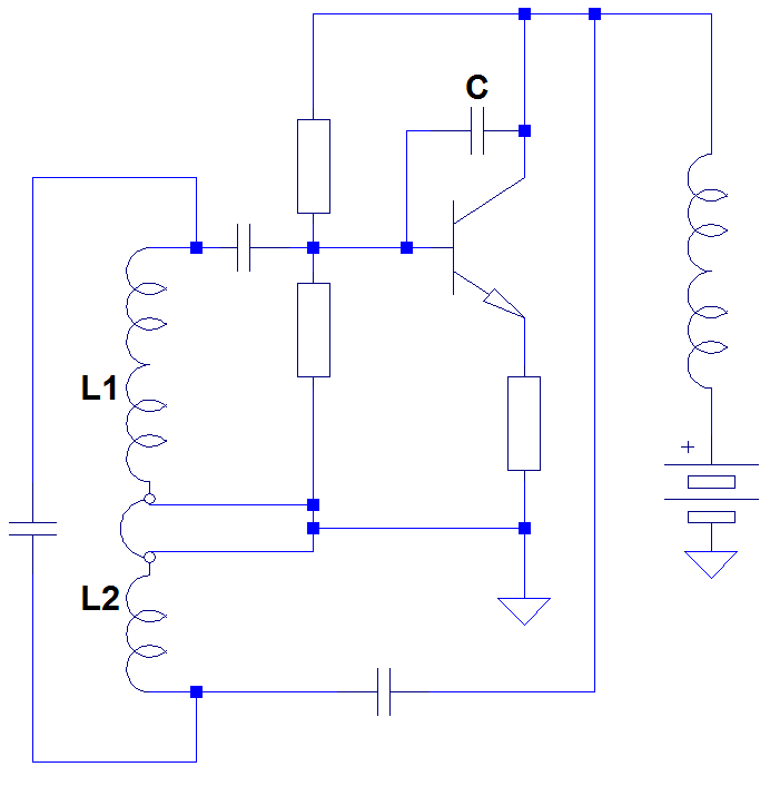 Joonis 2. Hartley ostsillaator positiivse tagasisidega läbi transistori sisendmahtuvuse